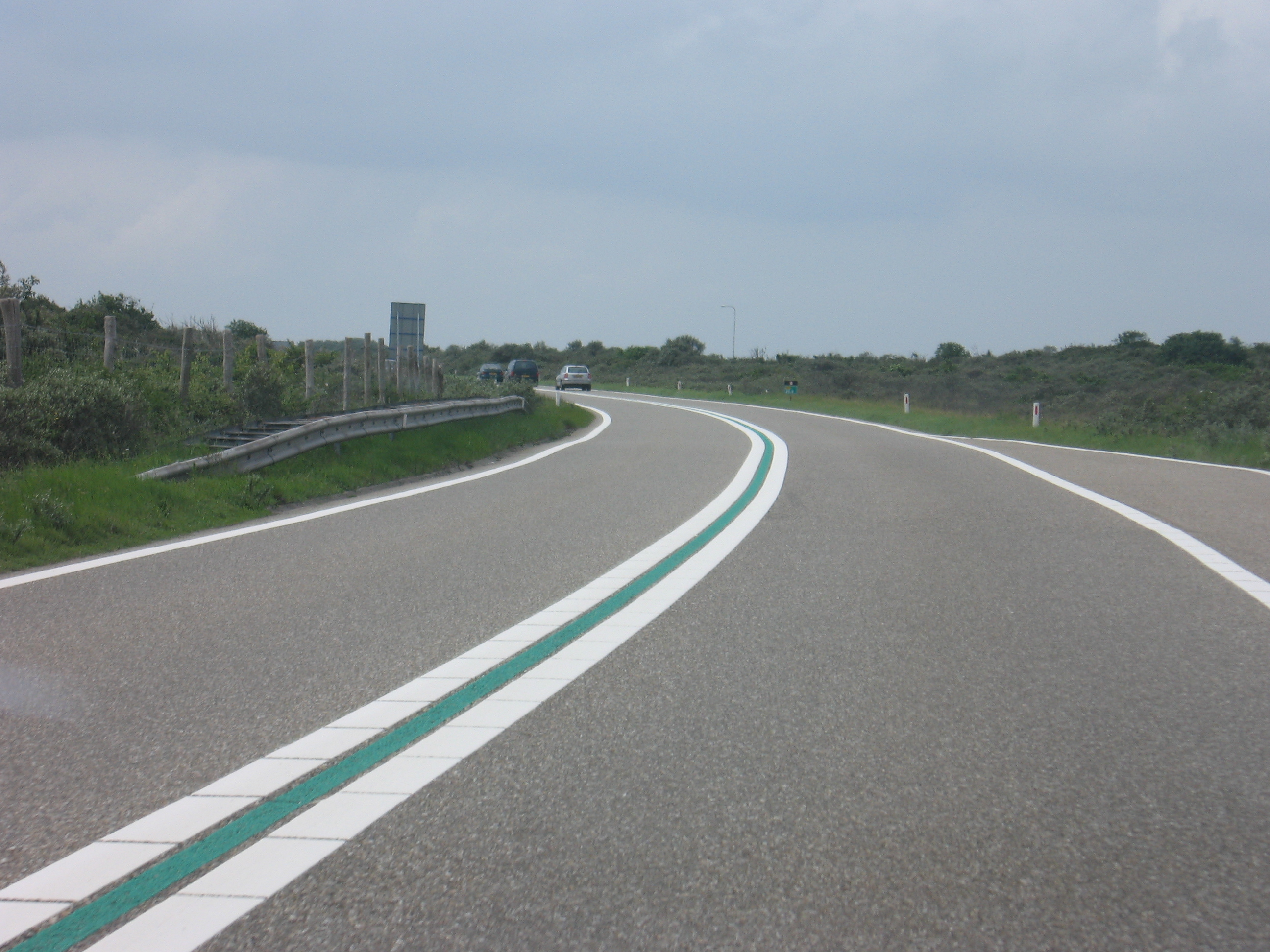 wegmarkering 100 km, groen (N57)